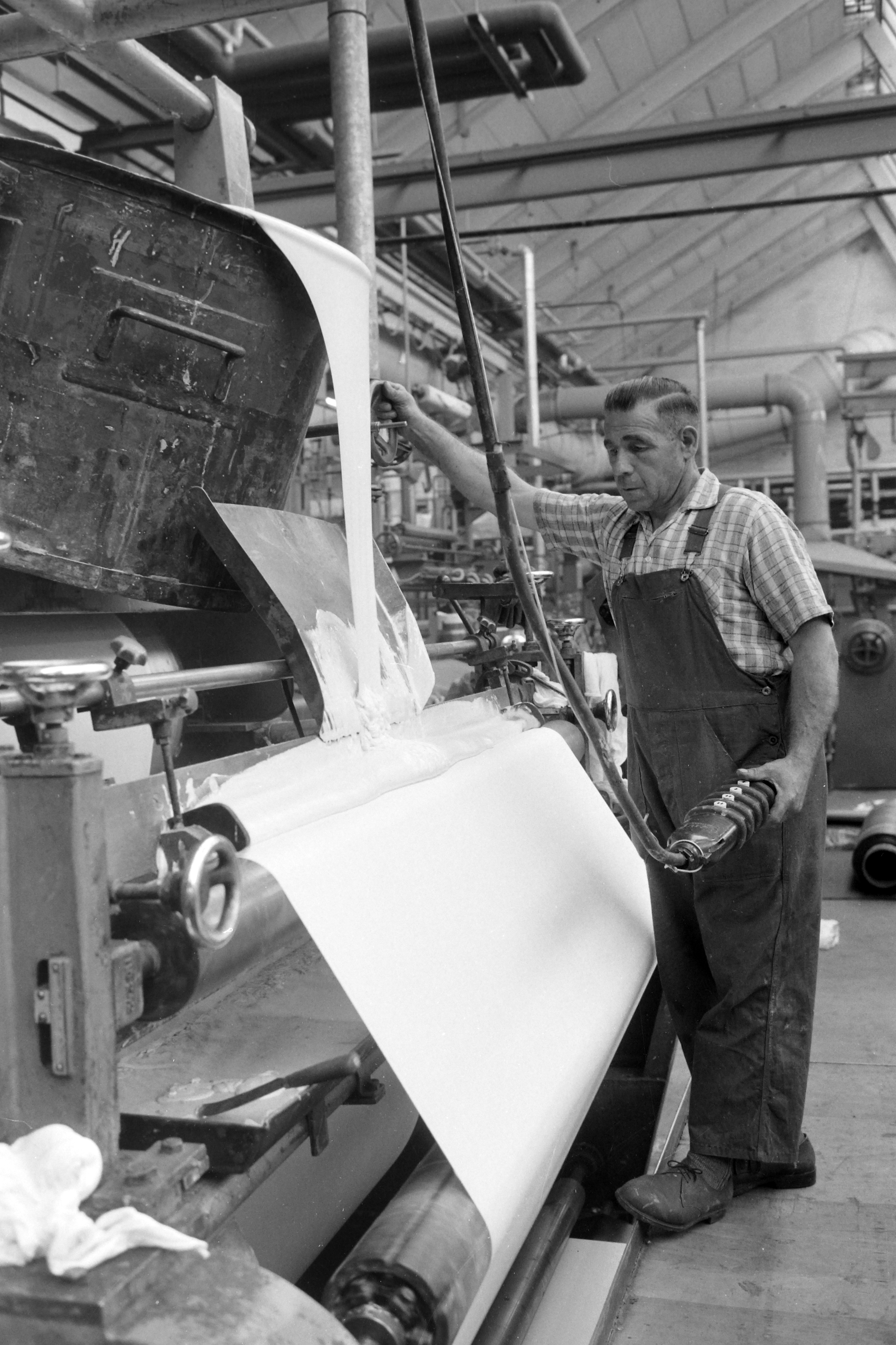 Diese noch undatierte Aufnahme aus dem Nachlass des Fotografen Jochen Mellin zeigt einen Streicher an einer Streichanlage für Papier an einem noch unidentifizierten Ort ohne Datum. Das Digitalisat wurde am 27. Juni 2017 erstmals vom Bildarchiv der Region Hannover (Signatur ARH NL Mellin 01-023/0015) der Öffentlichkeit mit der Lizenz CC BY-SA 3.0 zur Verfügung gestellt. Zugleich bittet das Archiv interessierte Bürger um Mitwirkung und Benachrichtigung an das Archiv zu Ort und Datum des Fotos ...